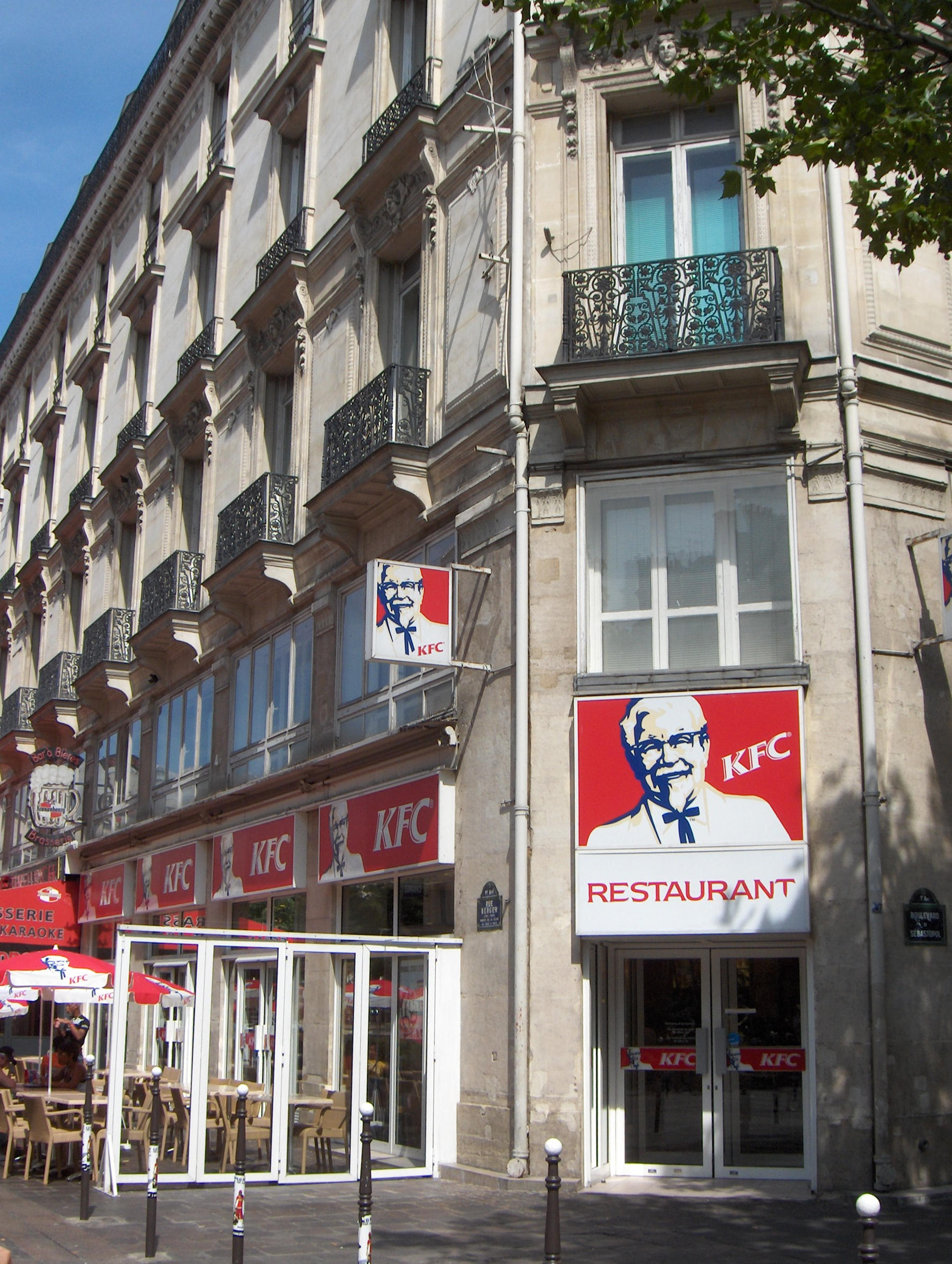 KFC restaurant in Paris, Boulevard de Sébastopol.